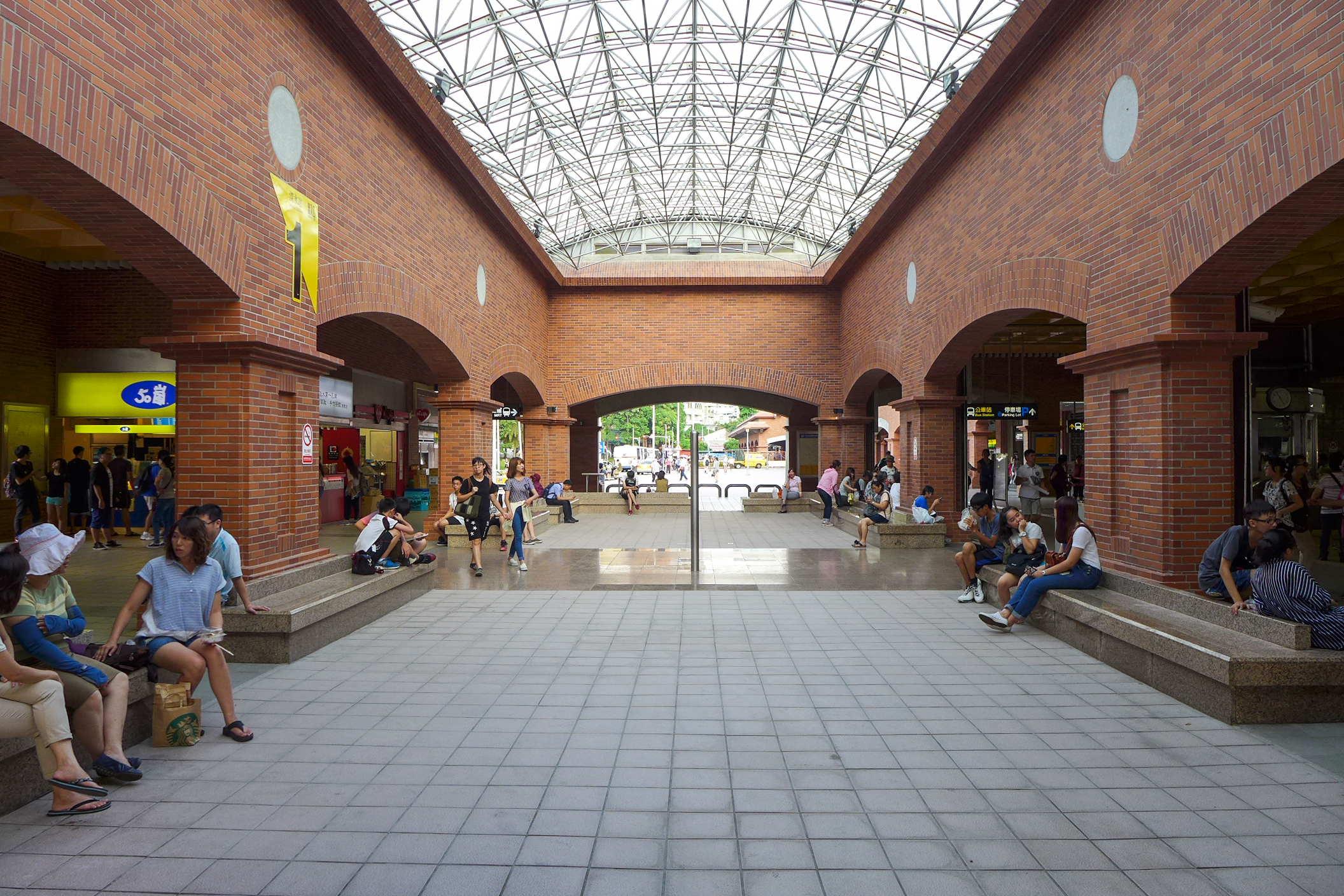 Tamsui Station Concourse